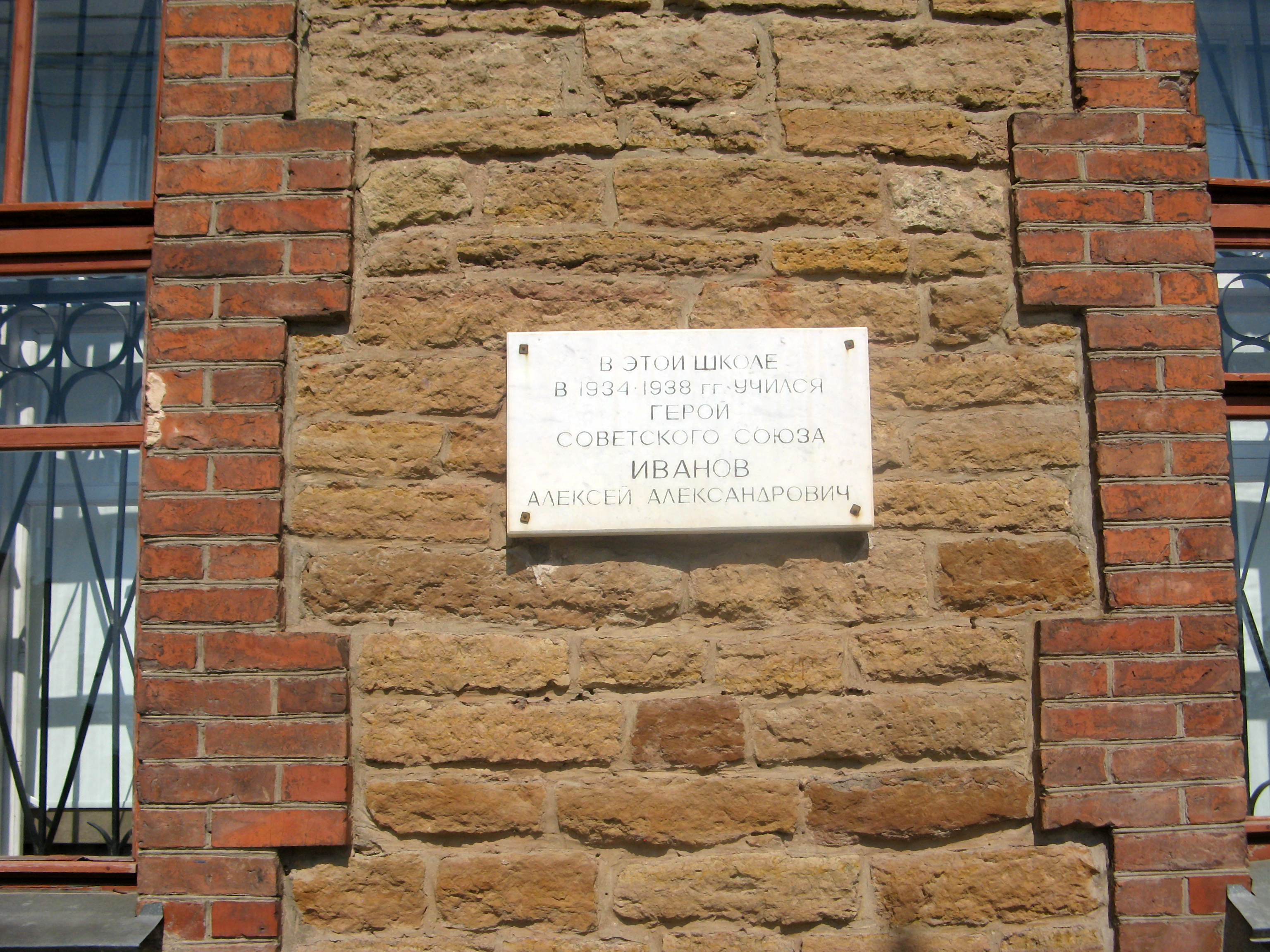 Коммерческое училище: проспект Карла Маркса, 1, Кингисепп, Ленинградская область